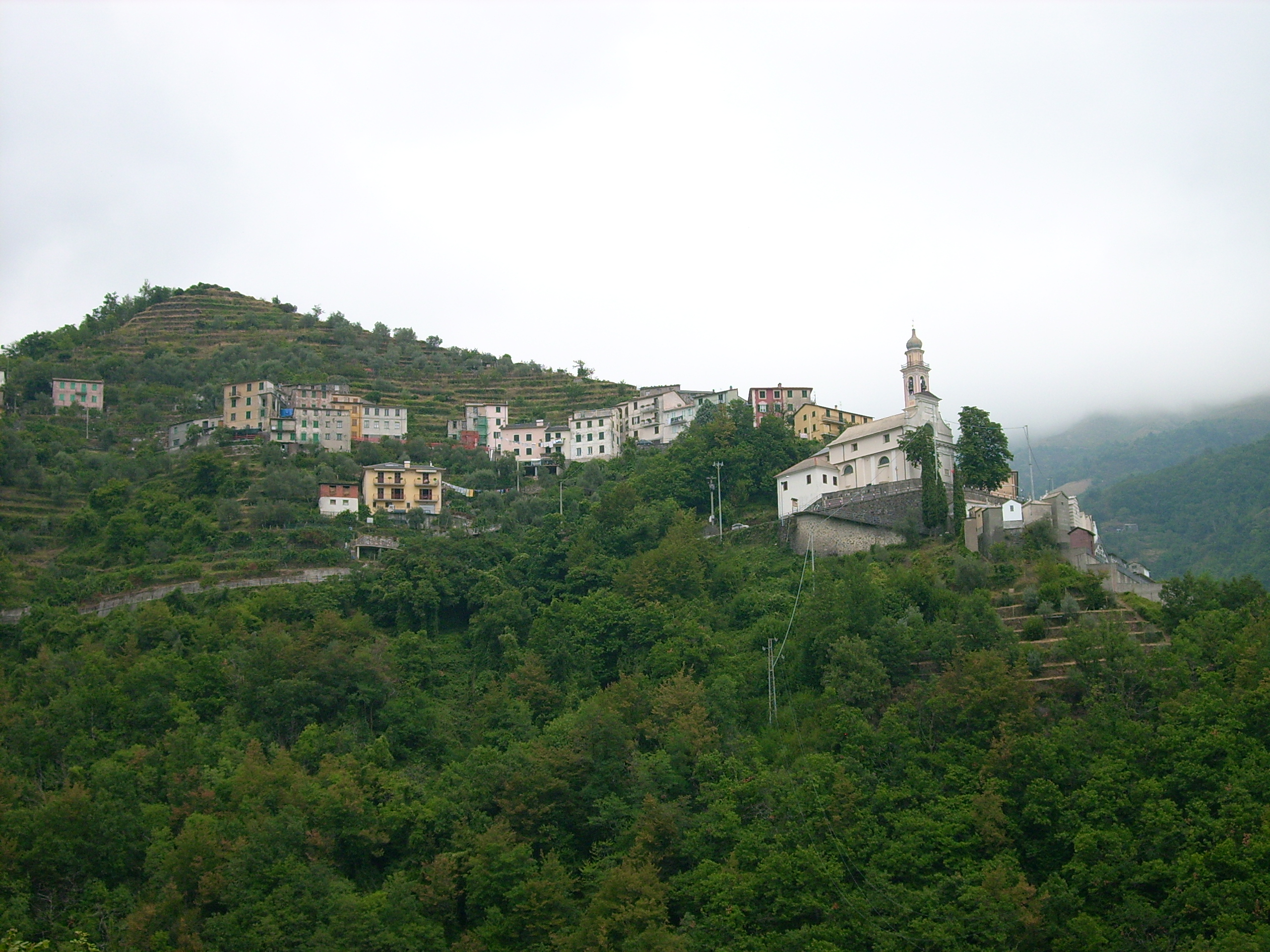 Panorama di Lorsica, Liguria, Italia